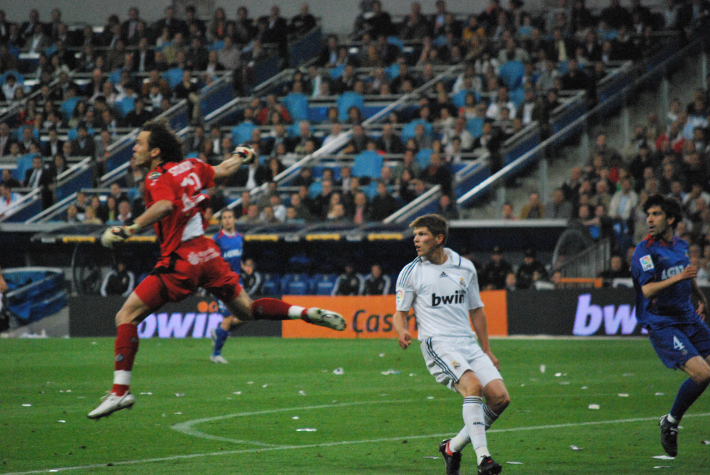 Real Madrid - Getafe